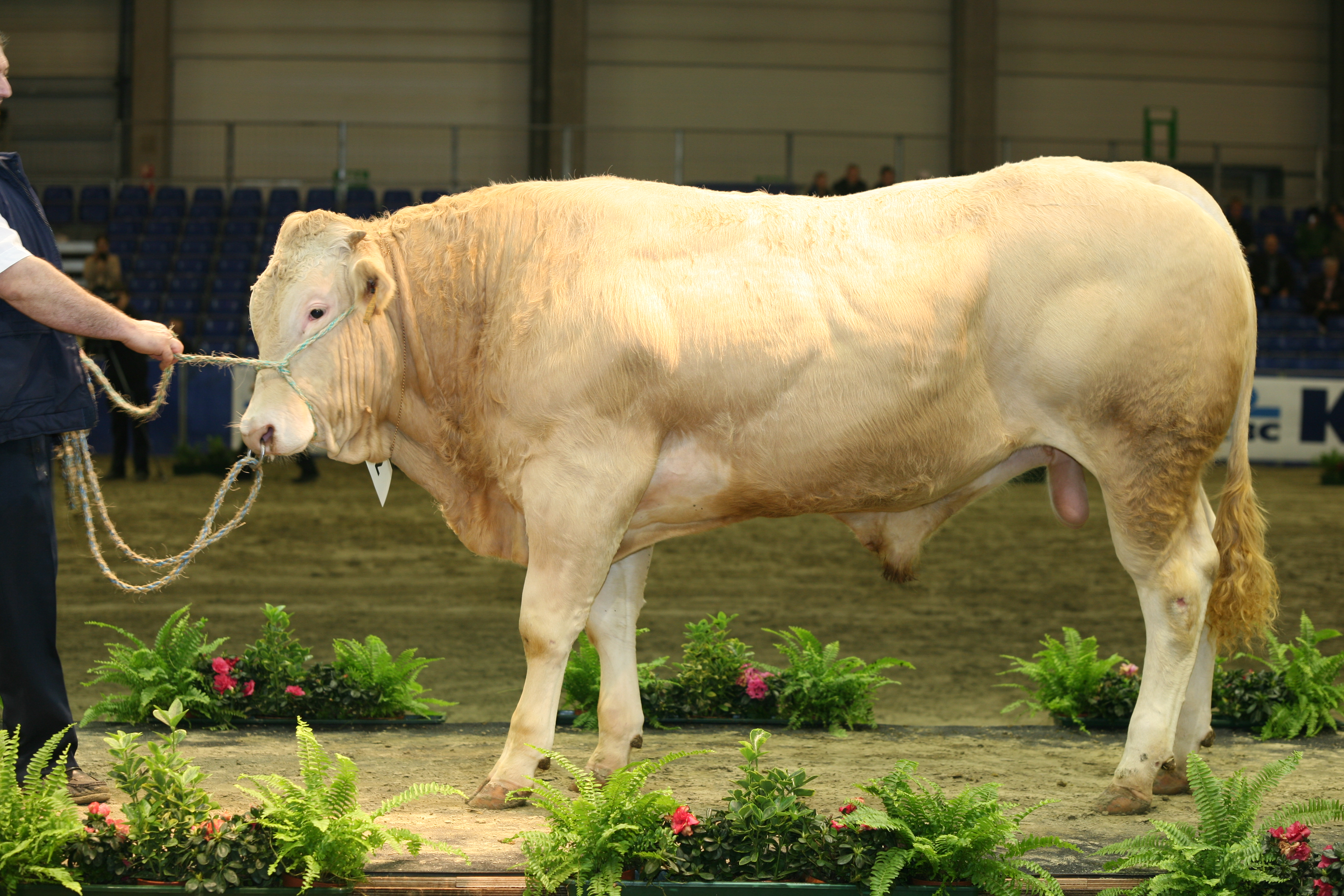 Blonde D'Aquitaine, Agriflanders 2007 - vleesvee